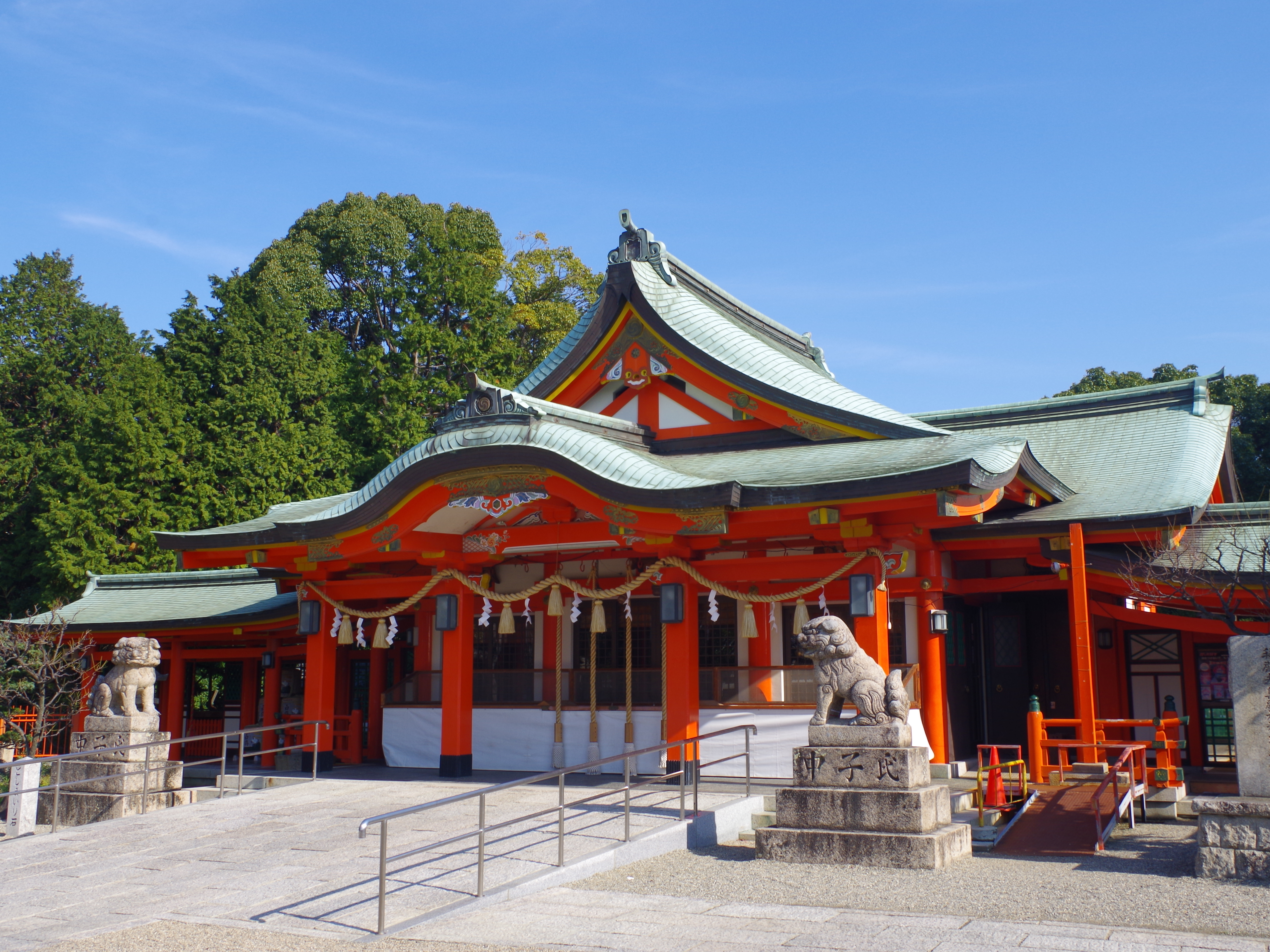 多治速比売神社拝殿 堺市南区にて Front shrine of Tajihayahime-jinja 2012.12.14